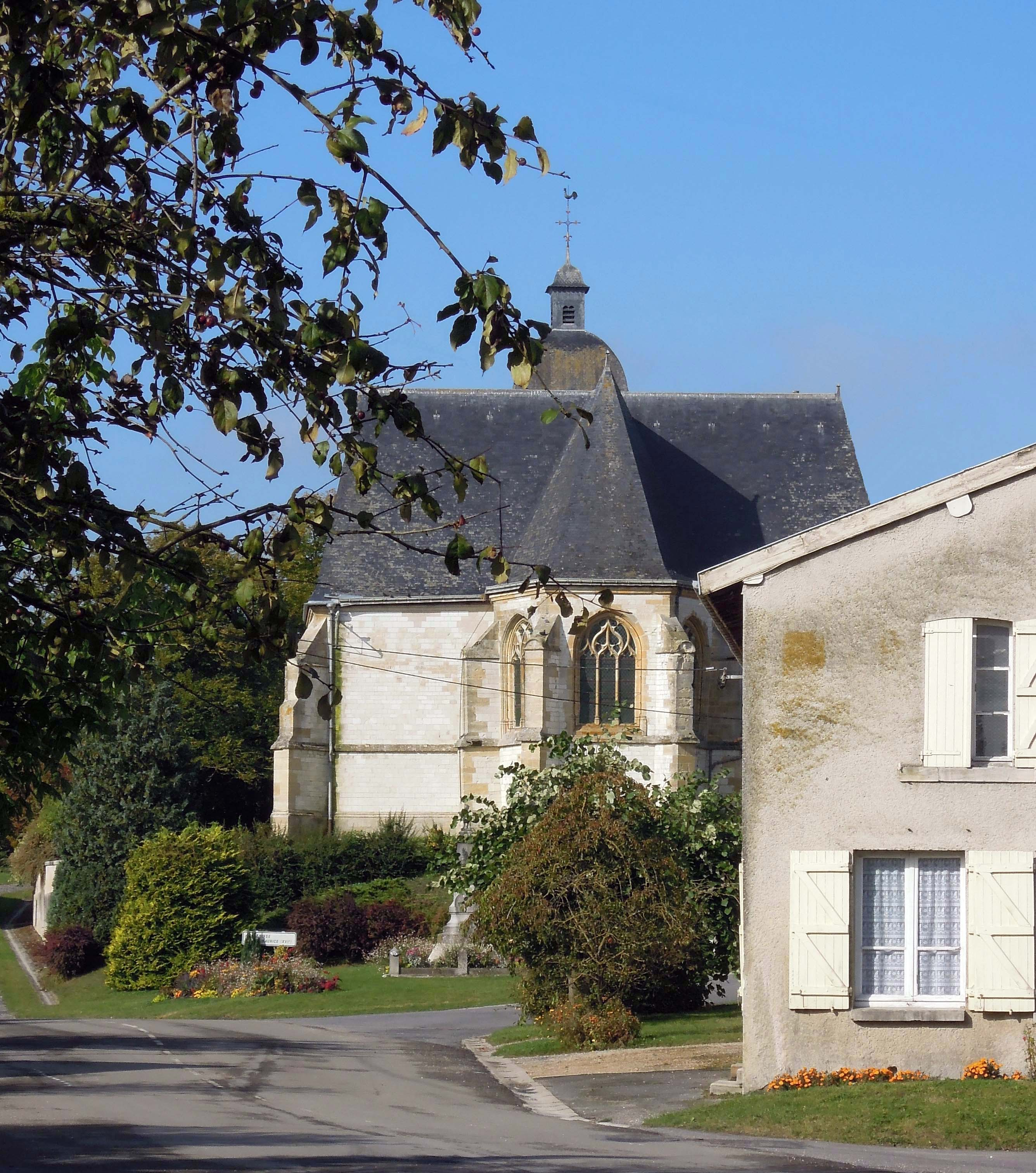 vue de l'église Saint Maurice de Saint Morel Ardennes .